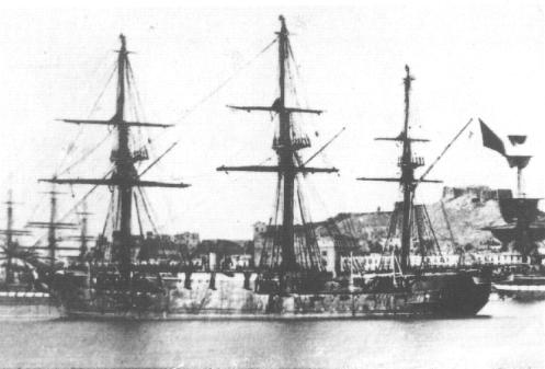 Fragata blindada Méndez Núñez (ex-resolución)